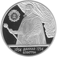 Монета Гетьман Данило Апостол реверс